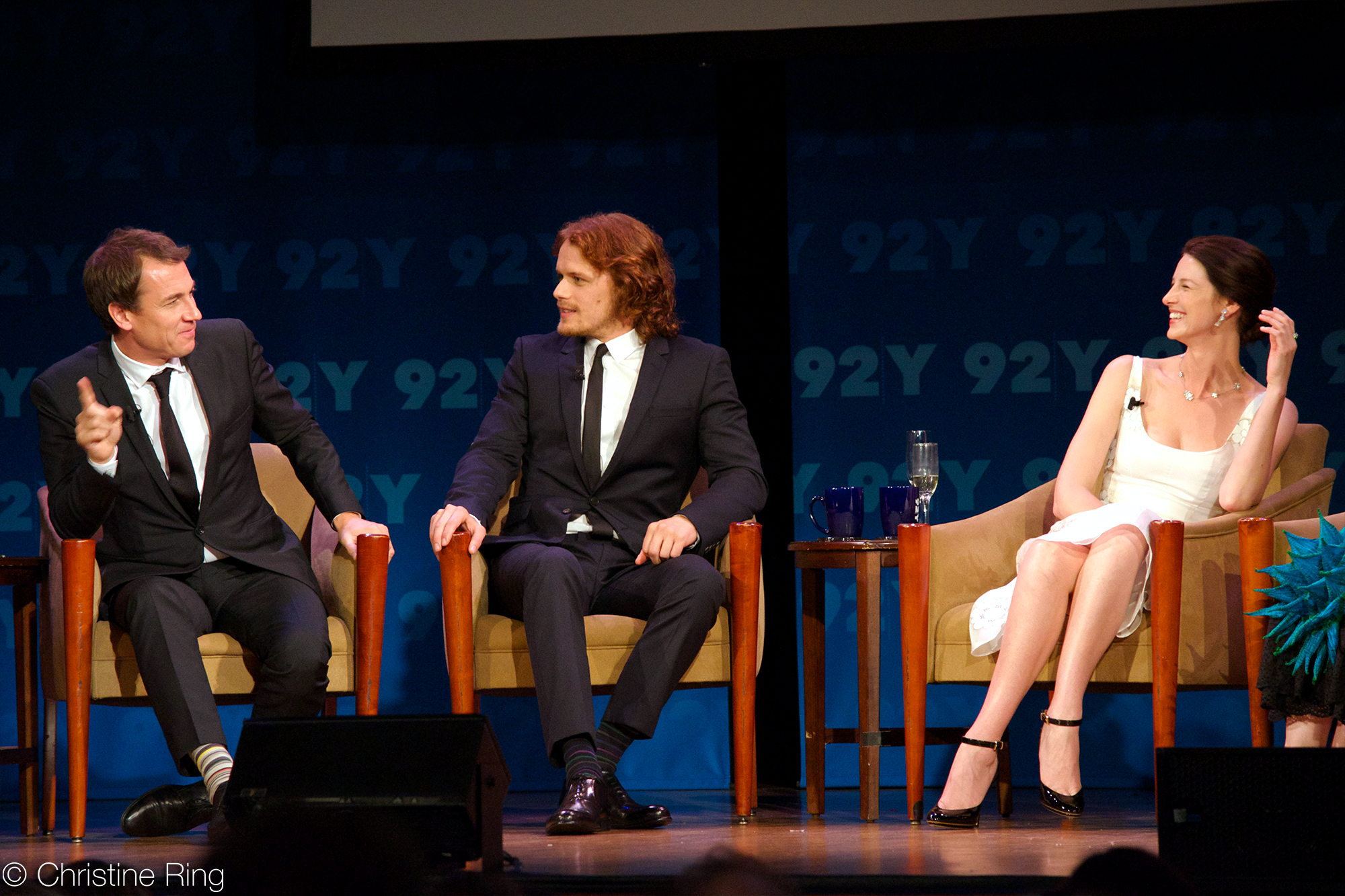 OLNY_054